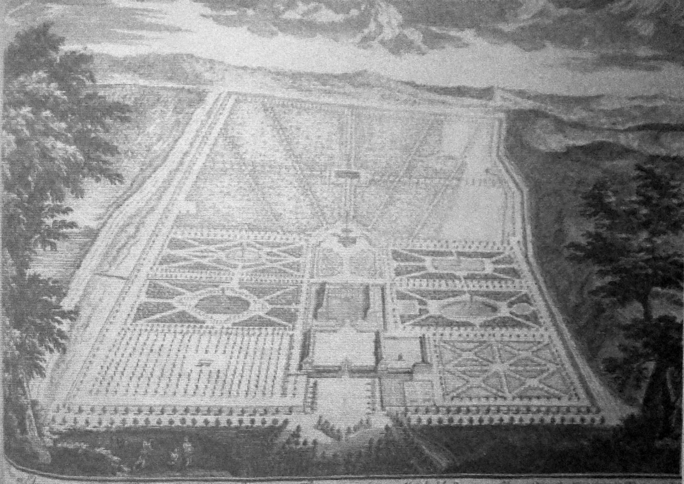 parc de Louvois Le Bouteux in plan et élévation du Château de Louvois 1685 p91.